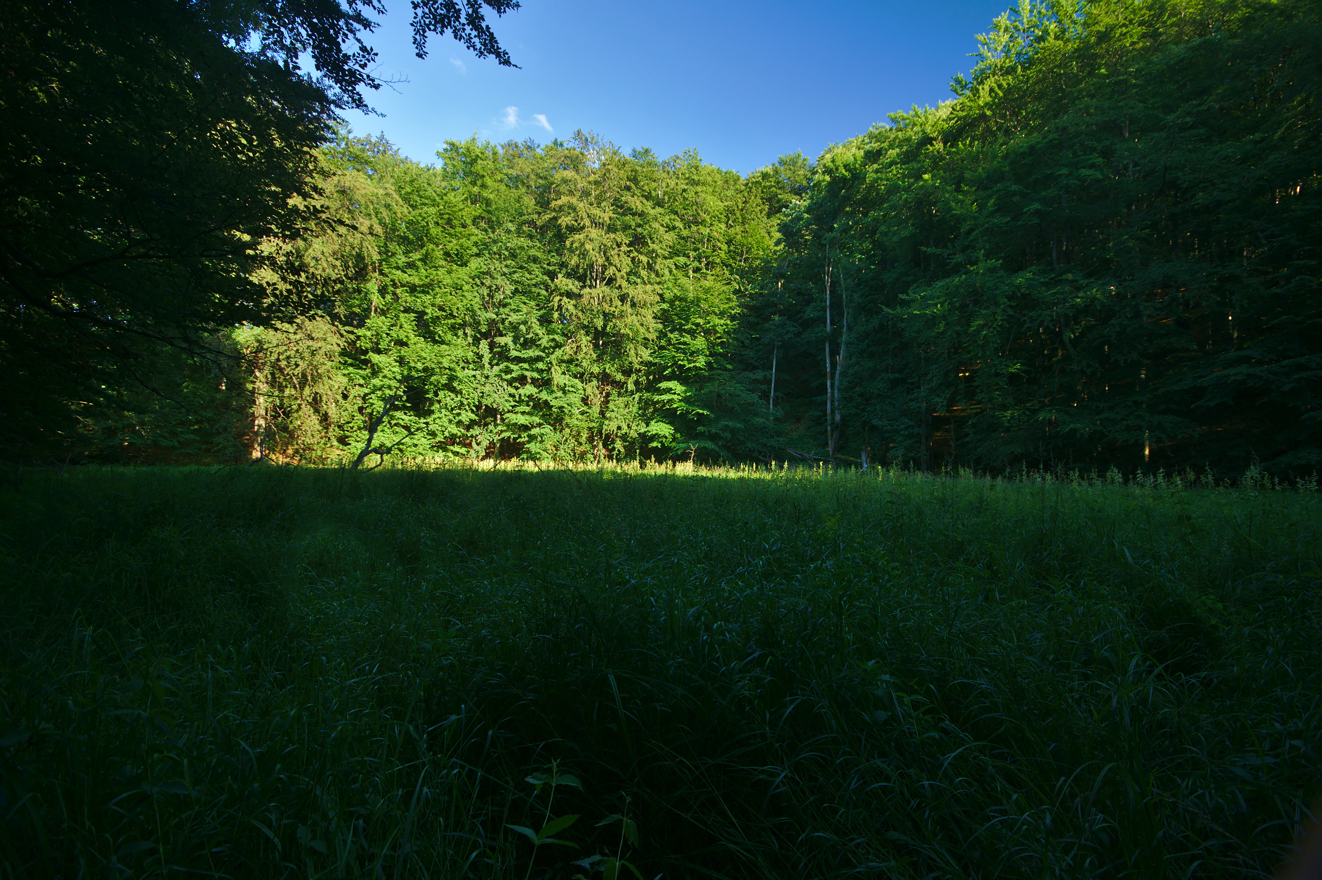 Prírodná rezervácia Ďurova mláka, CHKO Vihorlat